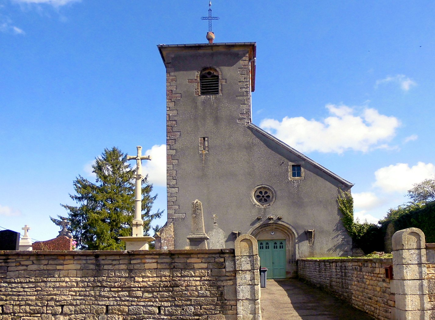 L'église Saint-Martin de Montdoré